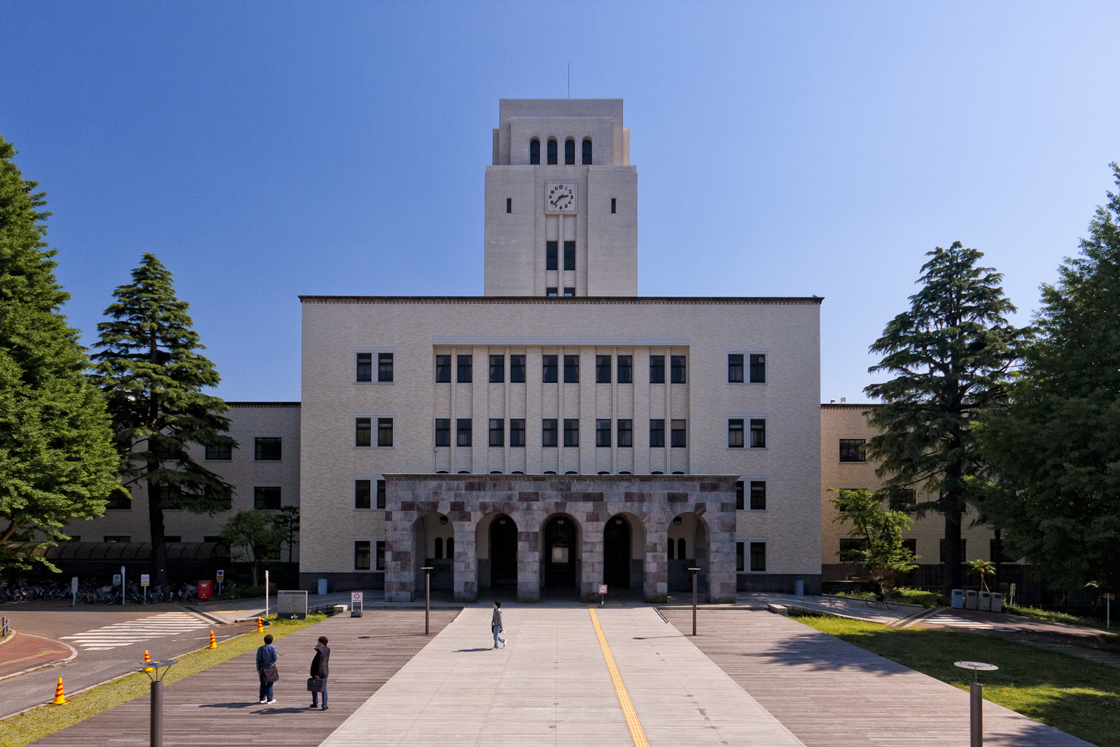 The main building of Ookayama Campus, Tokyo Institute of Technology.